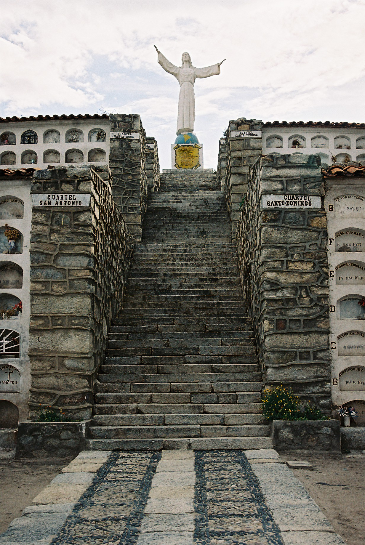 Yungay cemetery in Ancash, Peru.